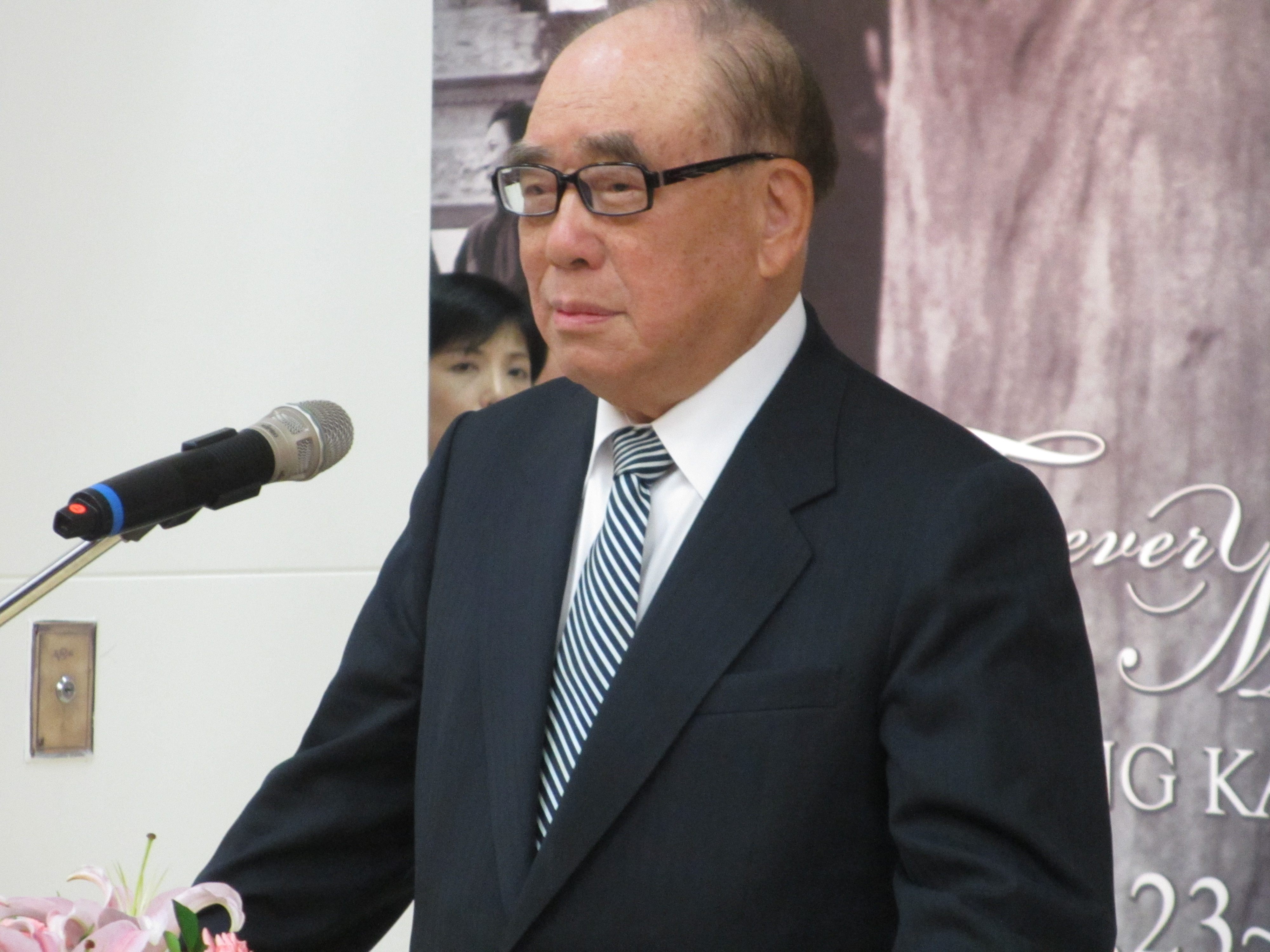 台灣前行政院長郝柏村。